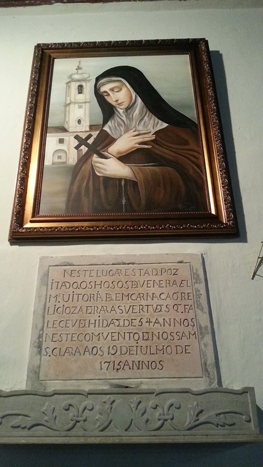 Lápide da Madre Vitória da Encarnação no convento do Desterro da Bahia (acima da lápide a pintura do artista Maicon Dandi)